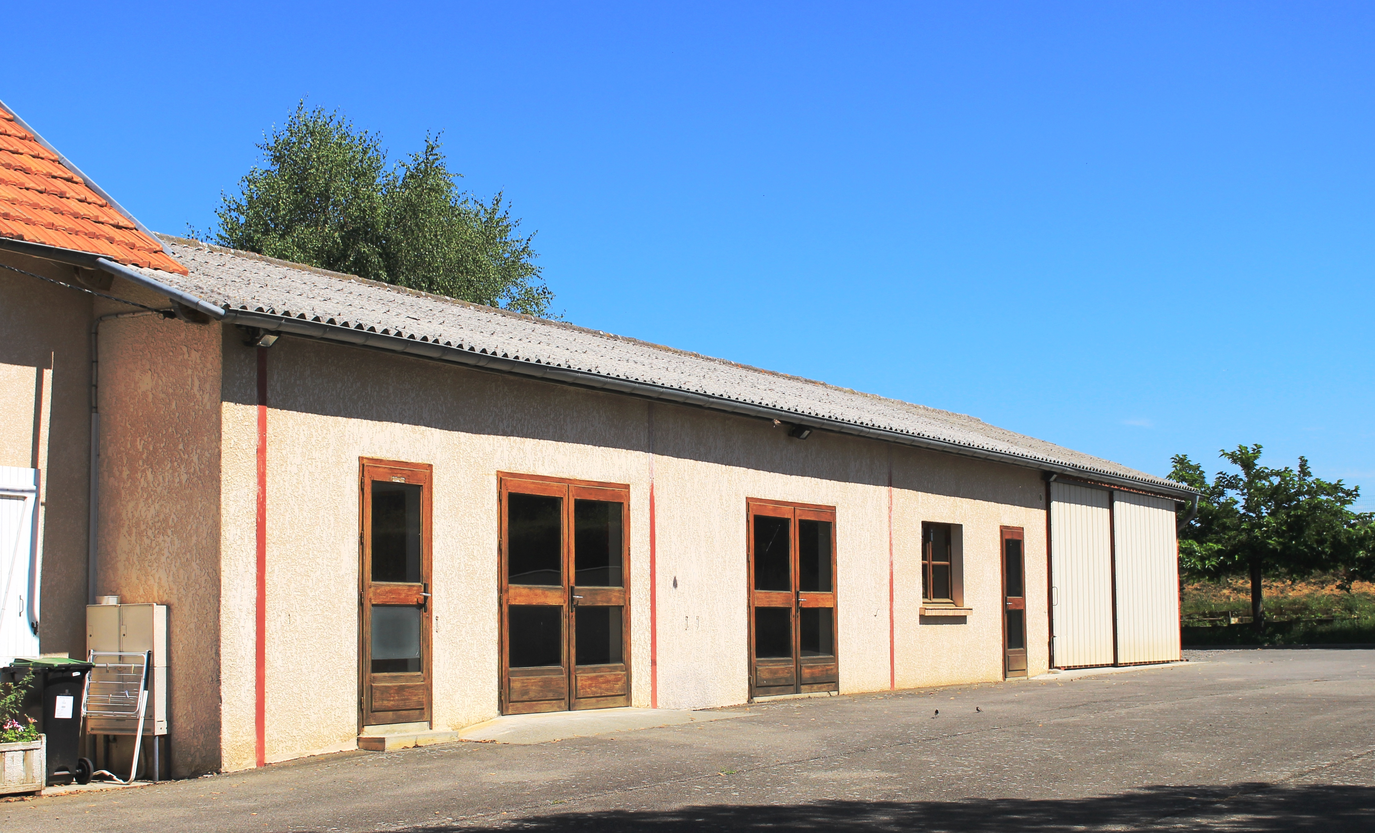 Salle des fêtes de Caharet (Hautes-Pyrénées)